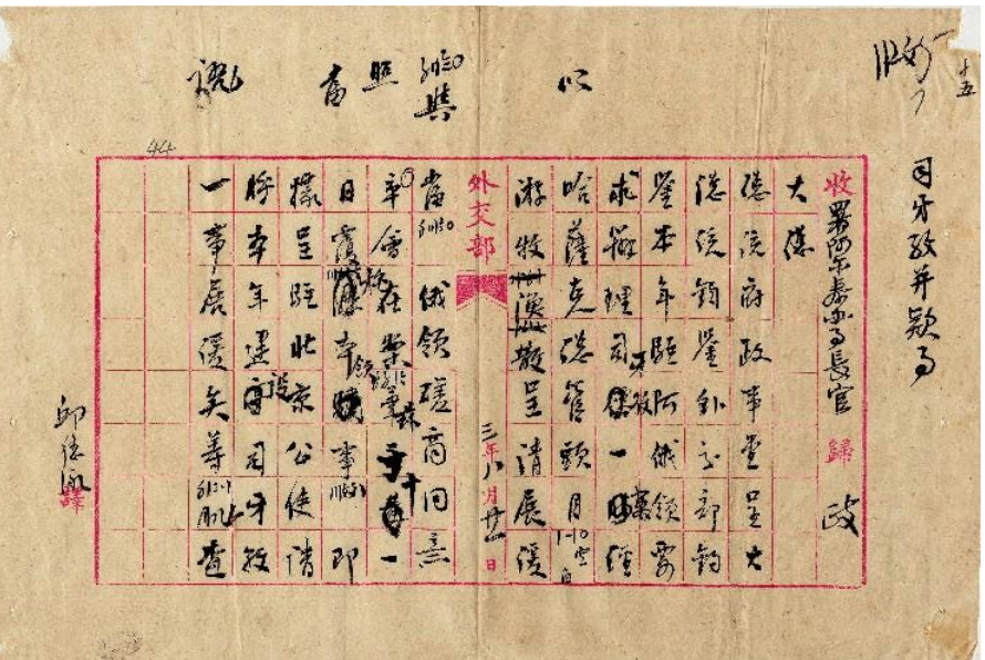 中文（中国大陆）: 民國03年08月，署阿爾泰辦事長官劉長炳《辦理司牙孜及請款事暫緩由》